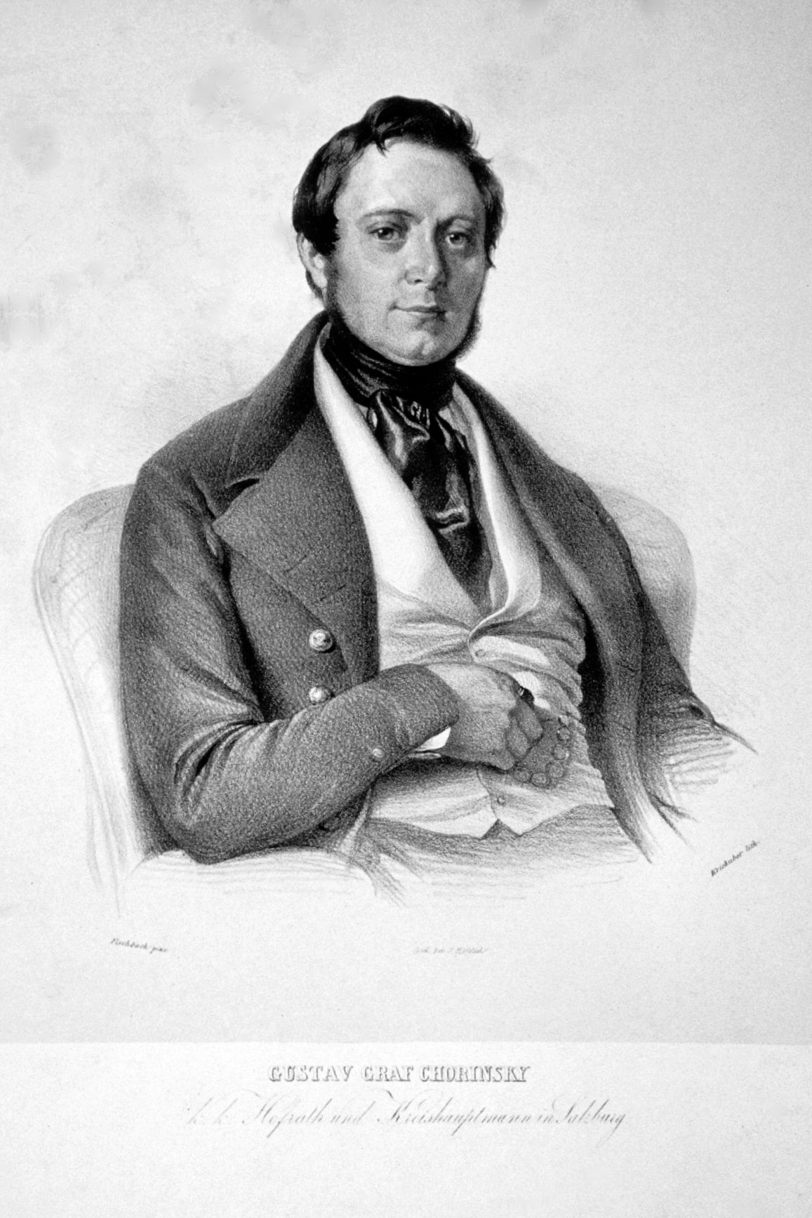 Gustav Graf Chorinsky (1806-1873), k. k. Geheimrat, Beamter. Lithographie von Josef Kriehuber, um 1845. Nach einem Gemälde von Johann Fischbach.